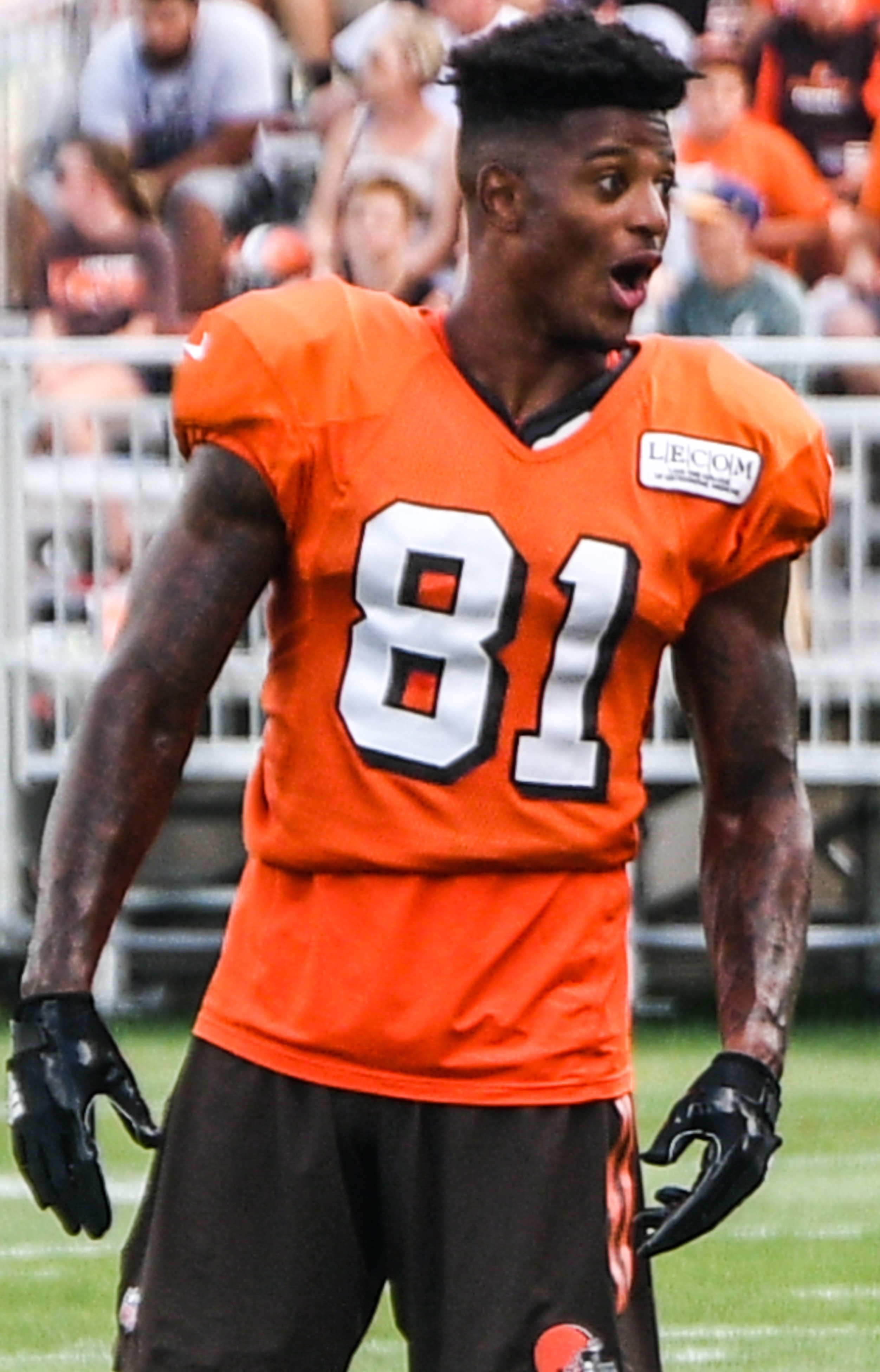 Rashard Higgins in 2017 training camp